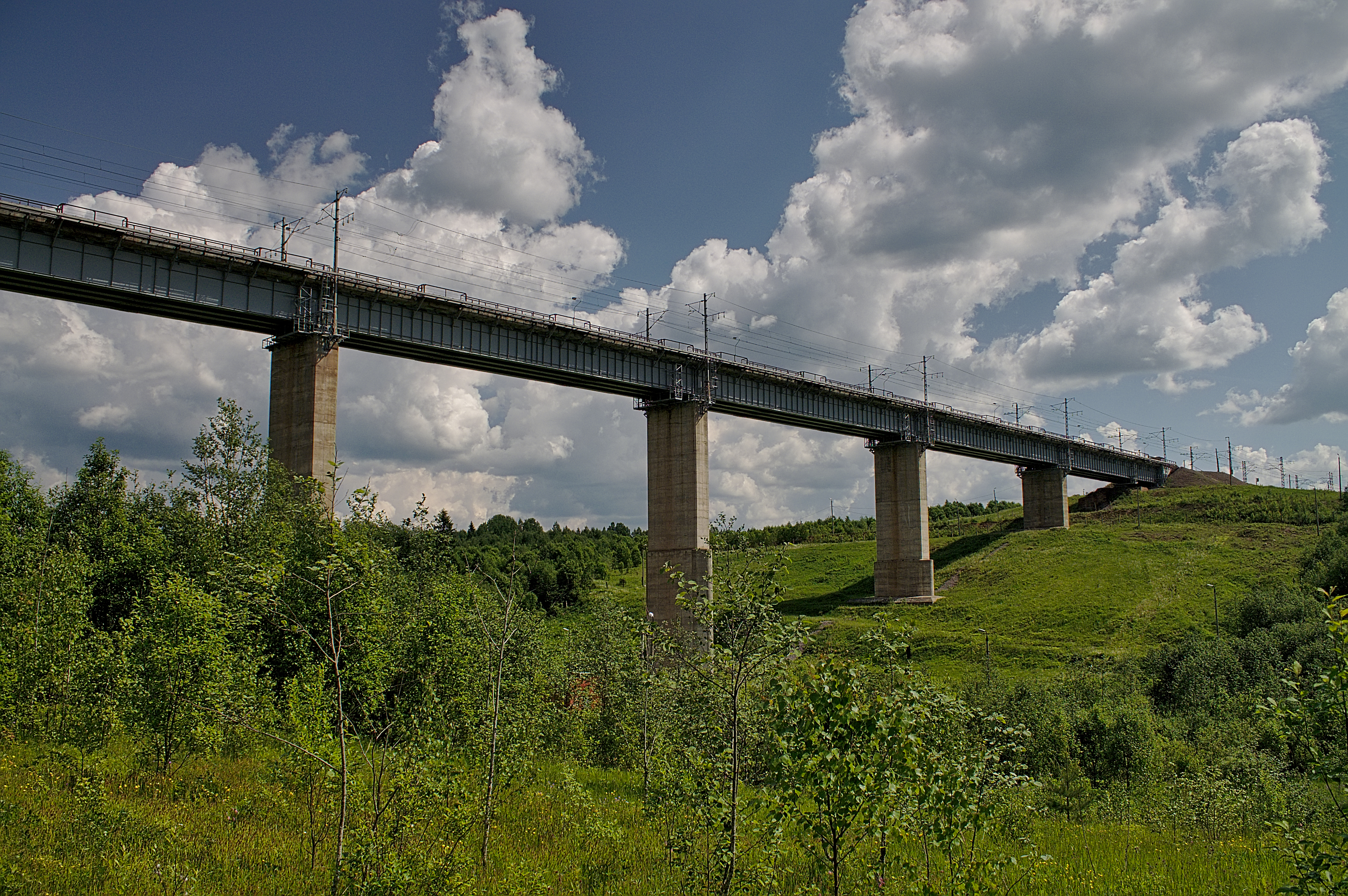 Веребьинский мост. см. фото 507917 в альбоме автора